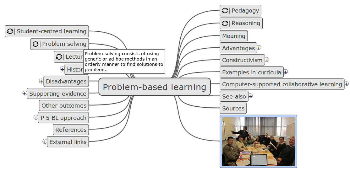 Problemetan oinarritutako ikaskuntza. Buru-mapa bat ingelesez, horretatik eratorria. ( webgunearen bidez automatikoki sortua).